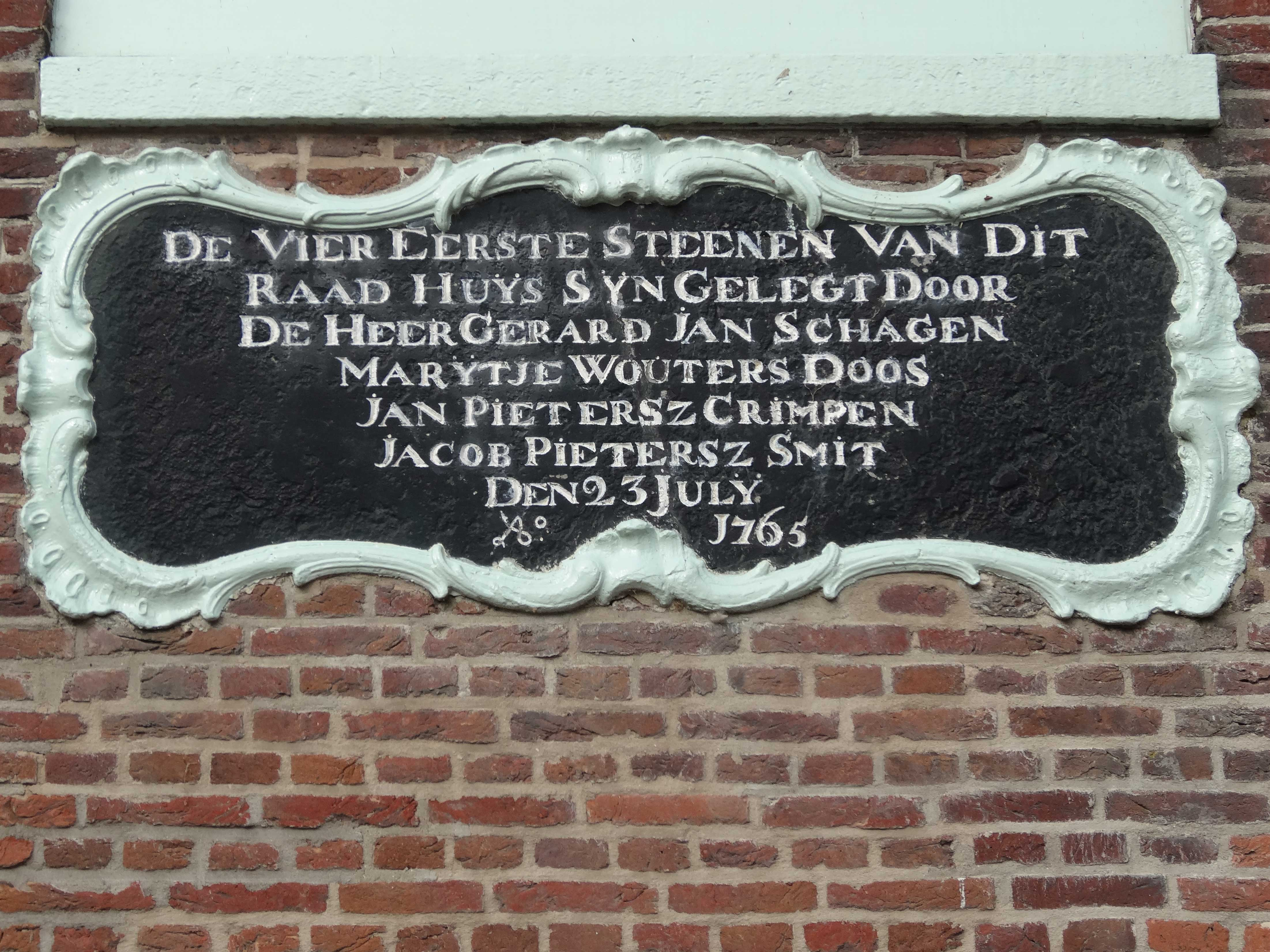 Voormalig raadhuis, thans bibliotheek, van Schellinkhout